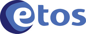 logo simple recréé des drogueries Etos